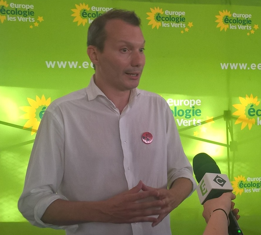 David Cormand, répond à la presse le 11 juin 2016 à Pantin, à l'occasion du Congrès Fédéral d'Europe Écologie Les Verts lors duquel il a été élu secrétaire nationale.